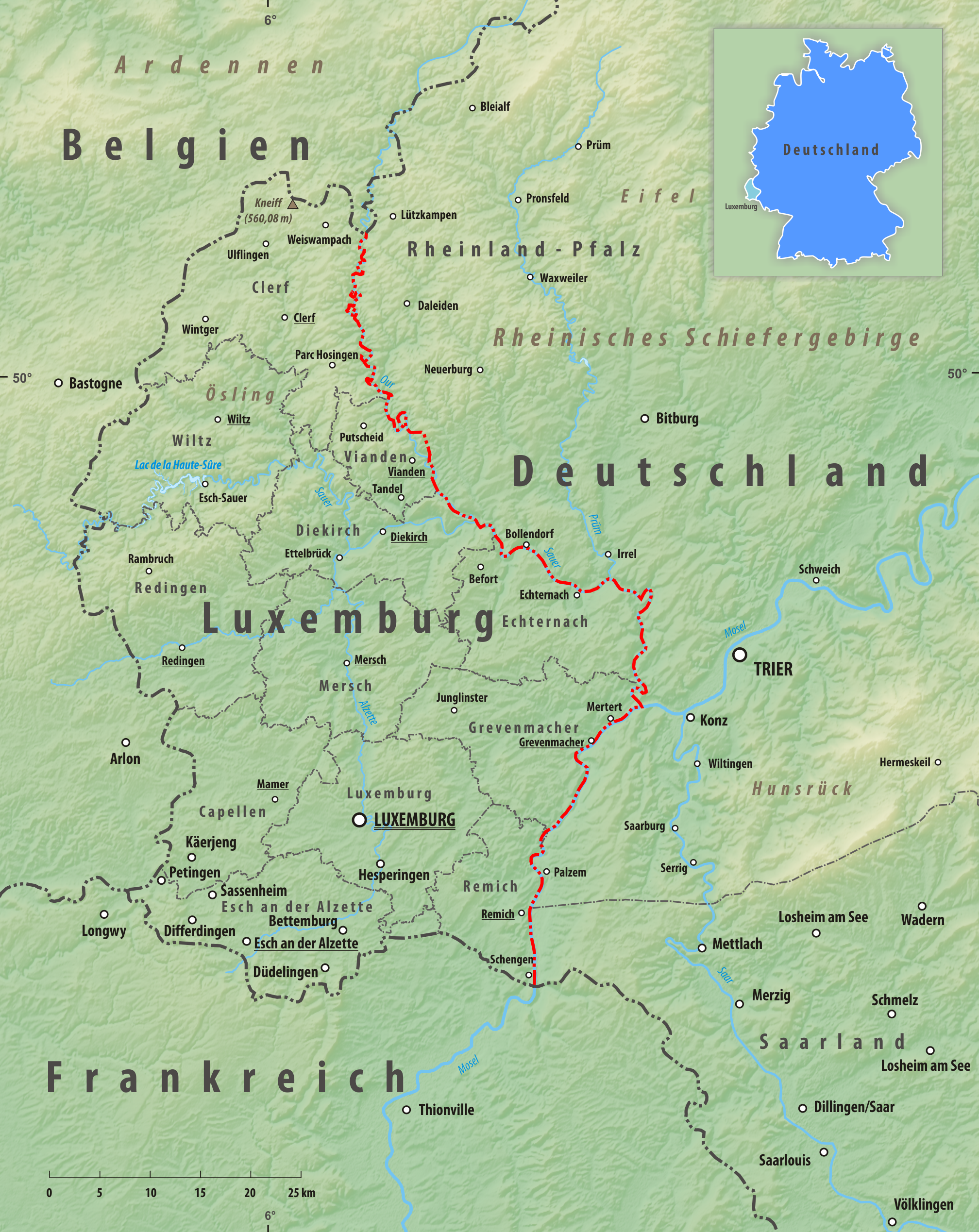 Reliefkarte des Grenzverlaufes zwischen Deutschland und Luxemburg Topographischer Hintergrund: NASA Shuttle Radar Topography Mission (public domain). SRTM3 v.2.